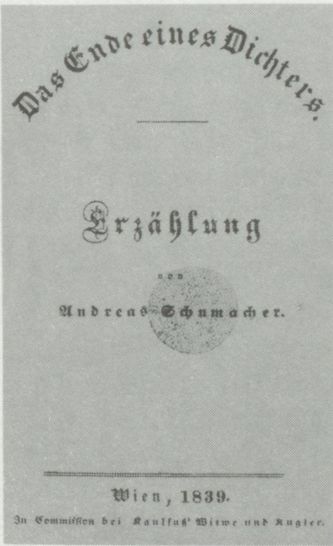 Andreas Schumacher Das Ende eines Dichters 1839 Titel